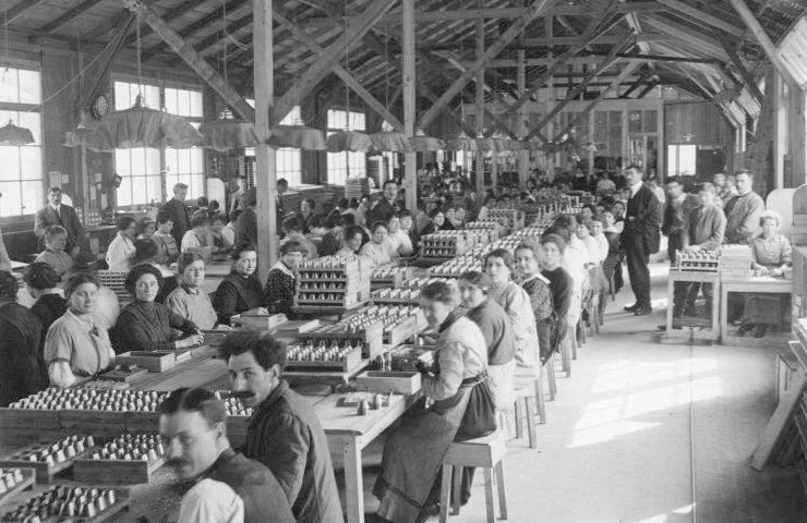 Montagehalle für Zünder in der Automobil- und Maschinenfabrik Piccard, Pictet & Cie. in Genf